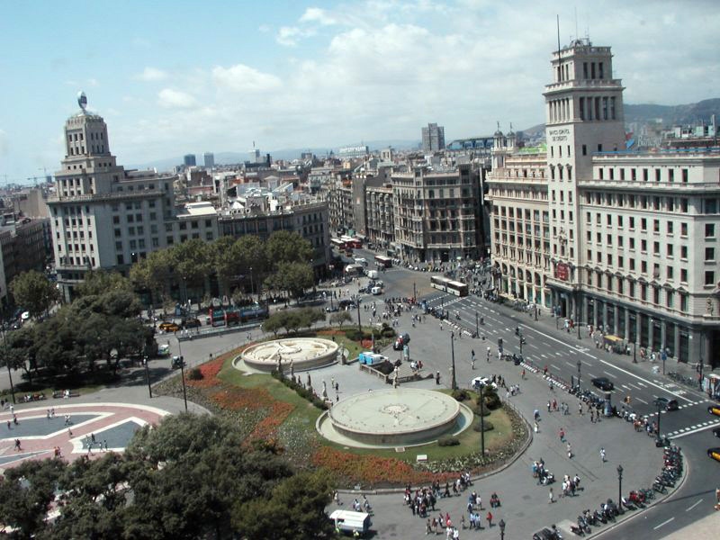 Vista general de la Plaza de Cataluña, Barcelona, España. 2008.